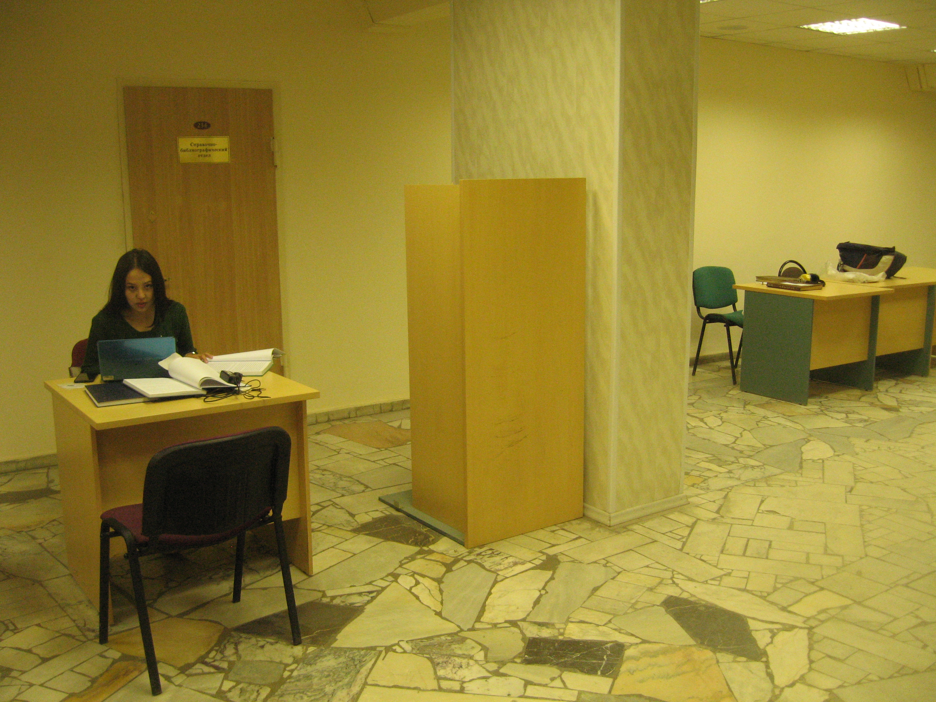 После занятия помещений Центральной научной медицинской библиотеки (Москва) под нужды 1 МГМУ им Сеченова (а также из-за ремонта) единственным доступным местом работы для читателей библиотеки стал коридор (шум, пыль, отсутствие настольных ламп, розеток и т.п.). В момент фотографирования читательницы (с её согласия) - основной читальный зал уже давно был отремонтирован; но его стали использовать под не-библиотечные нужды.